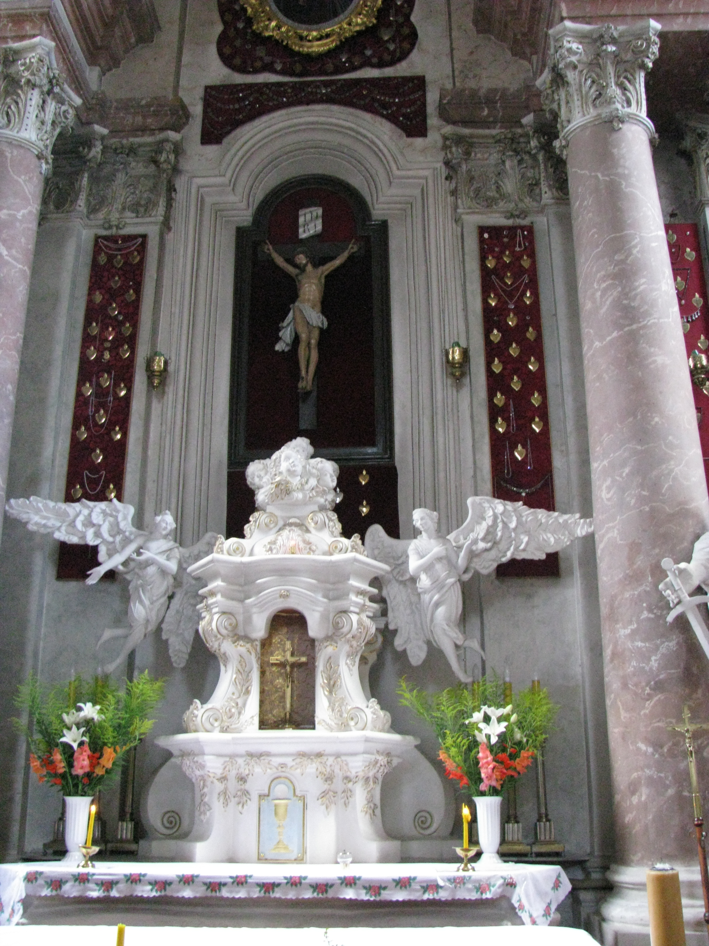 Беларуская (тарашкевіца): Ансамбаль Андрэеўскага касьцёлу:касьцёлжылы корпусбрама з агароджай. г. Слонім This is a photo of Belarusian heritage monument. Reference number: 412Г000498 ( WLM)